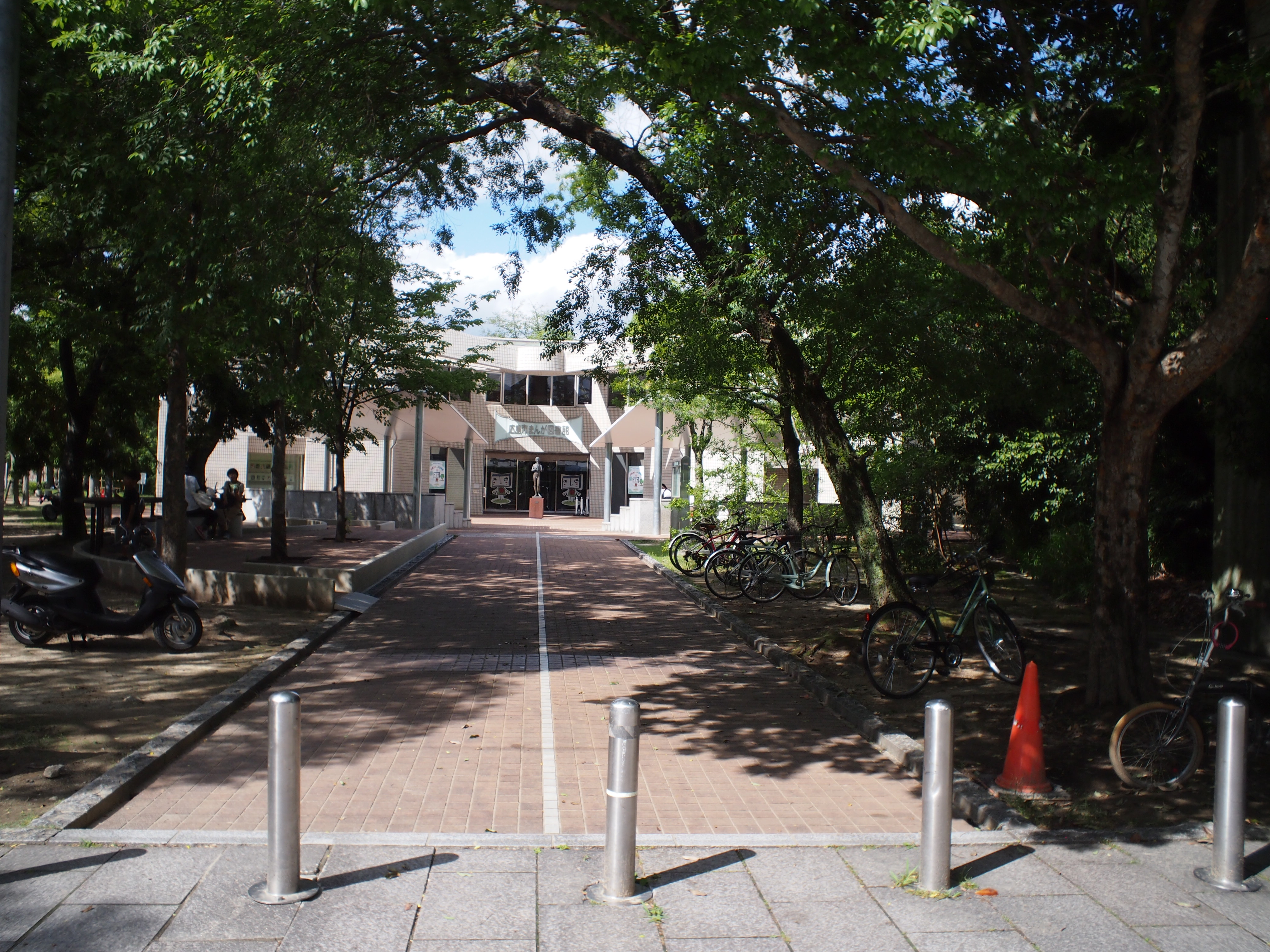 広島市マンガ図書館（比治山）